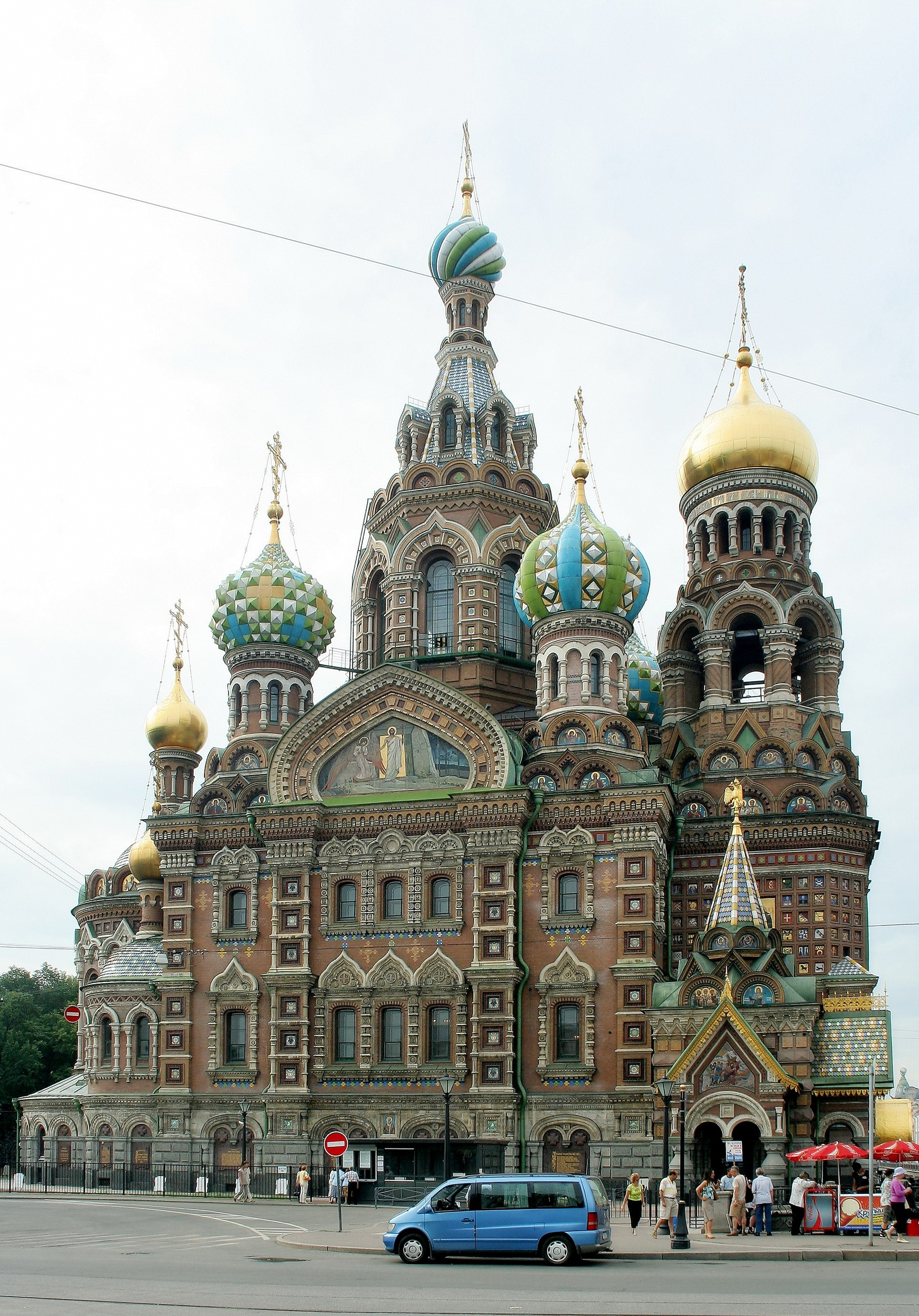 Heilig Blut Kathedrale ins St.Petersburg